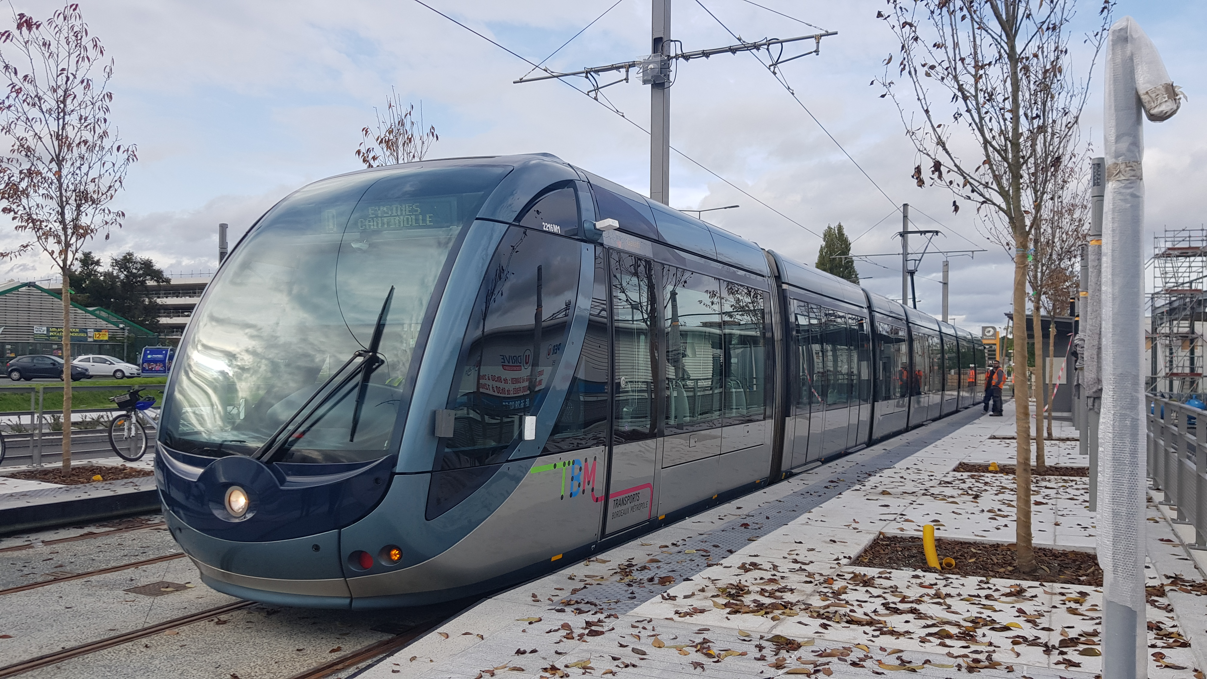 Premier essai sur la nouvelle ligne D du tramway, avec la première rame arrivant au terminus de Cantinolle à Eysines le mercredi 23 octobre 2019.